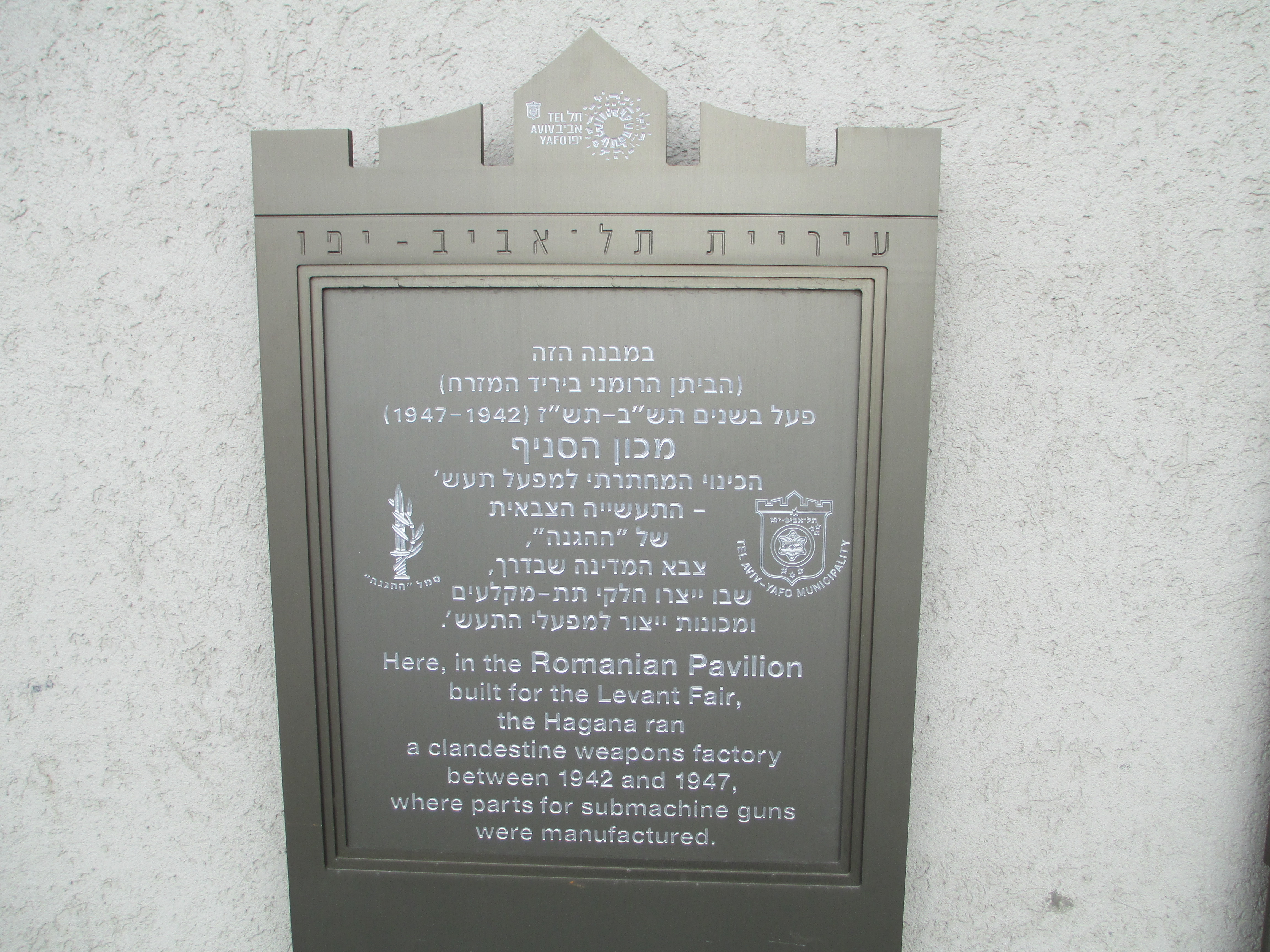 שלט הנצחה למפעל תע"ש ביריד המזרח